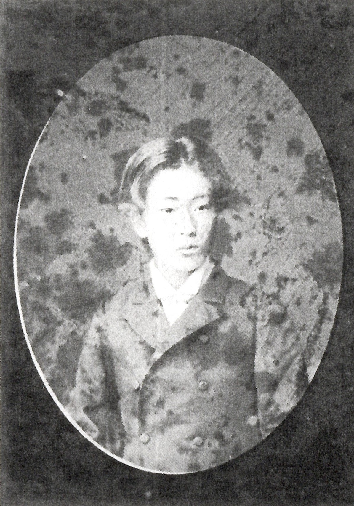 出羽上山藩主松平信安の肖像写真。